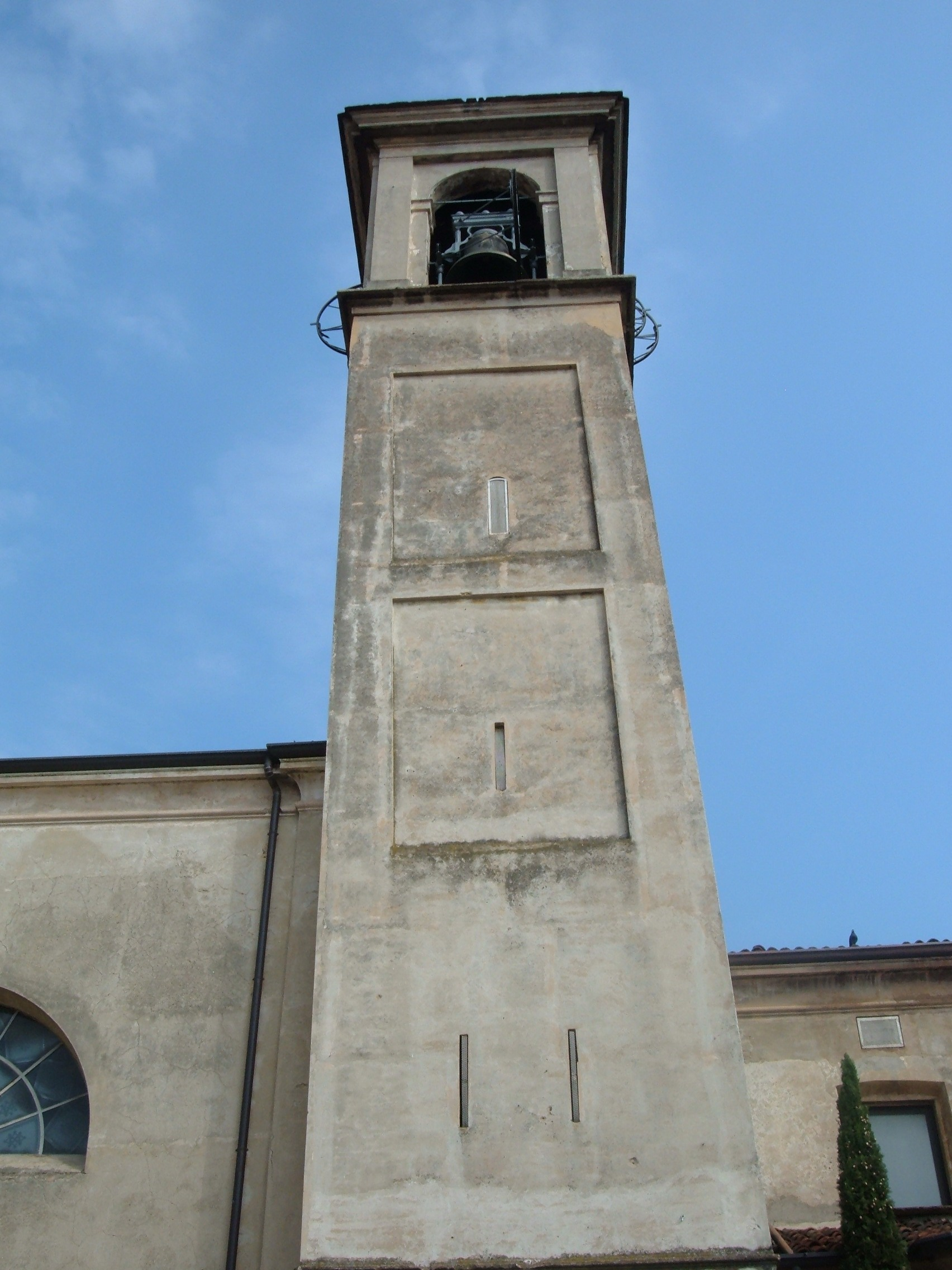 Chiesa di Santo Stefano a Garlate (prov. Lecco)